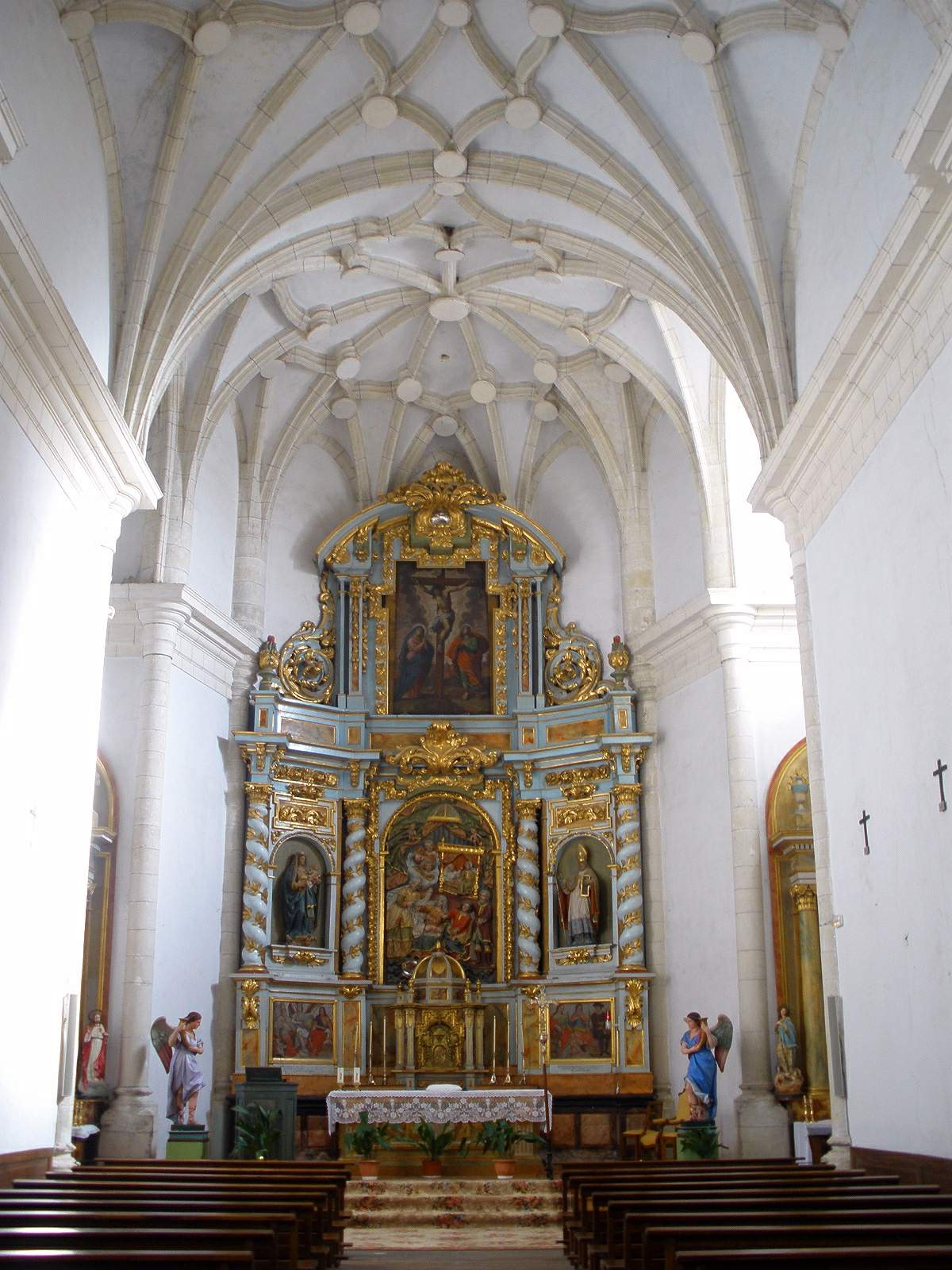 Arcaya (Álava) - Iglesia de la Natividad de Nuestra Señora